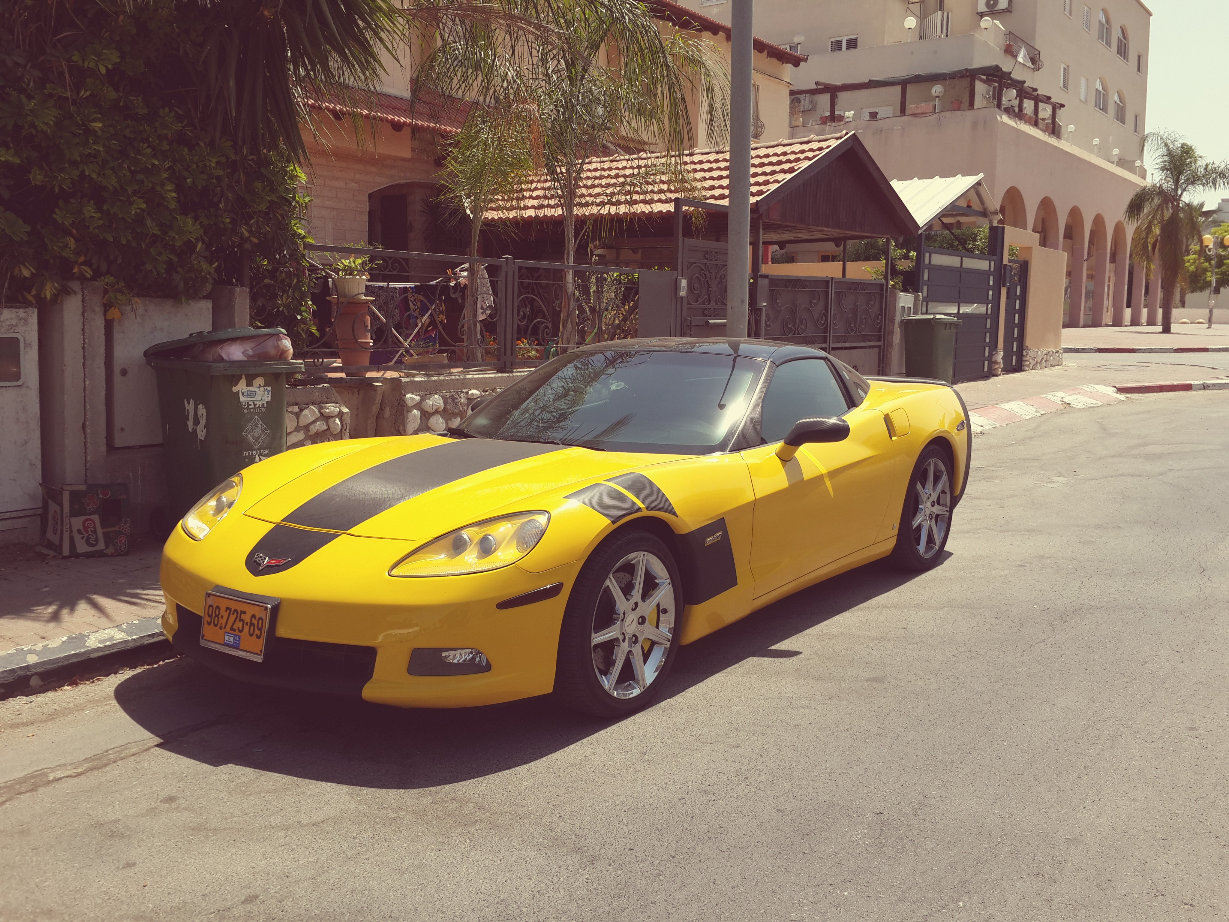 מכונית שברולט קורבט